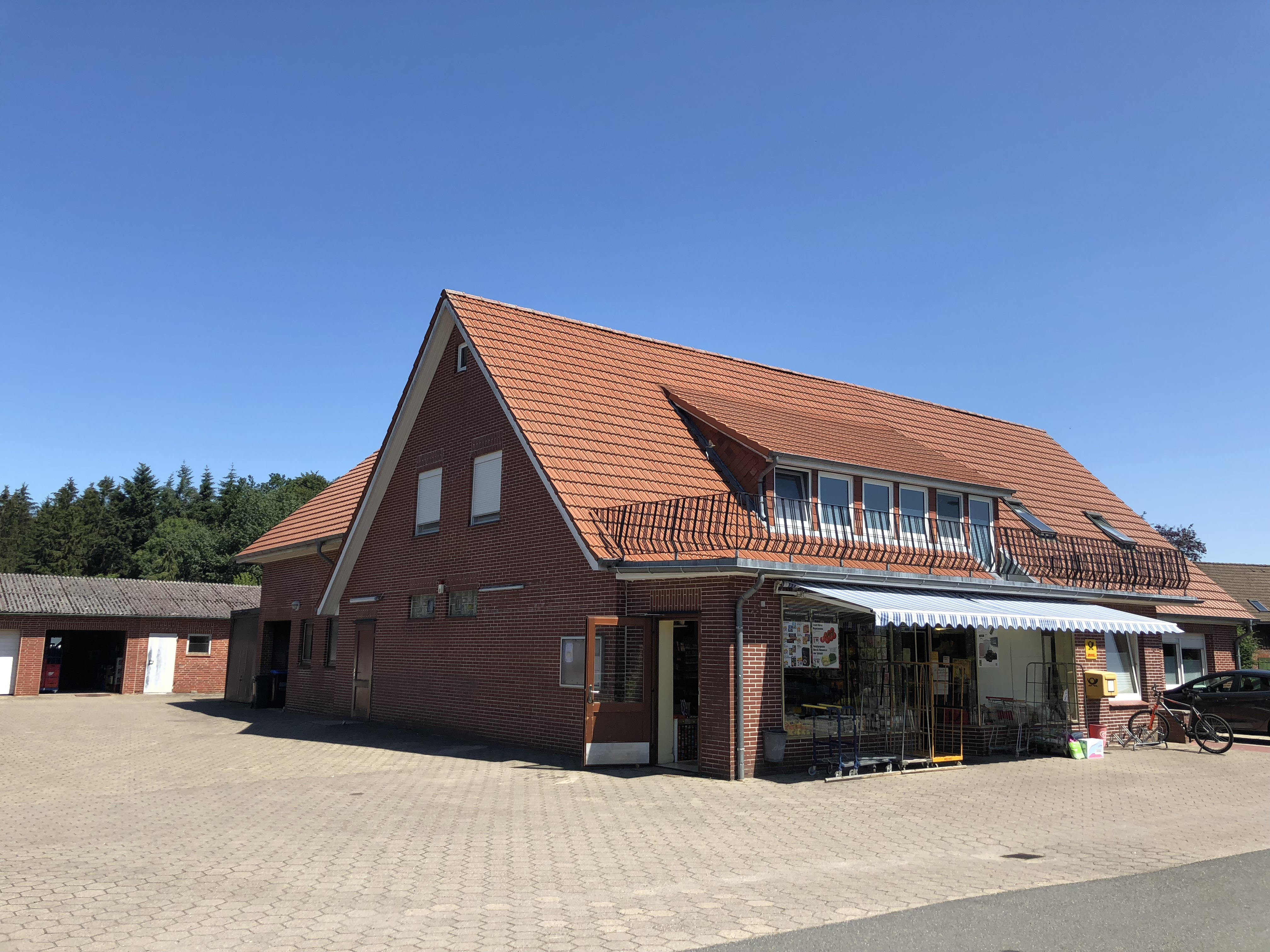 Dörpladen in Wiegersen